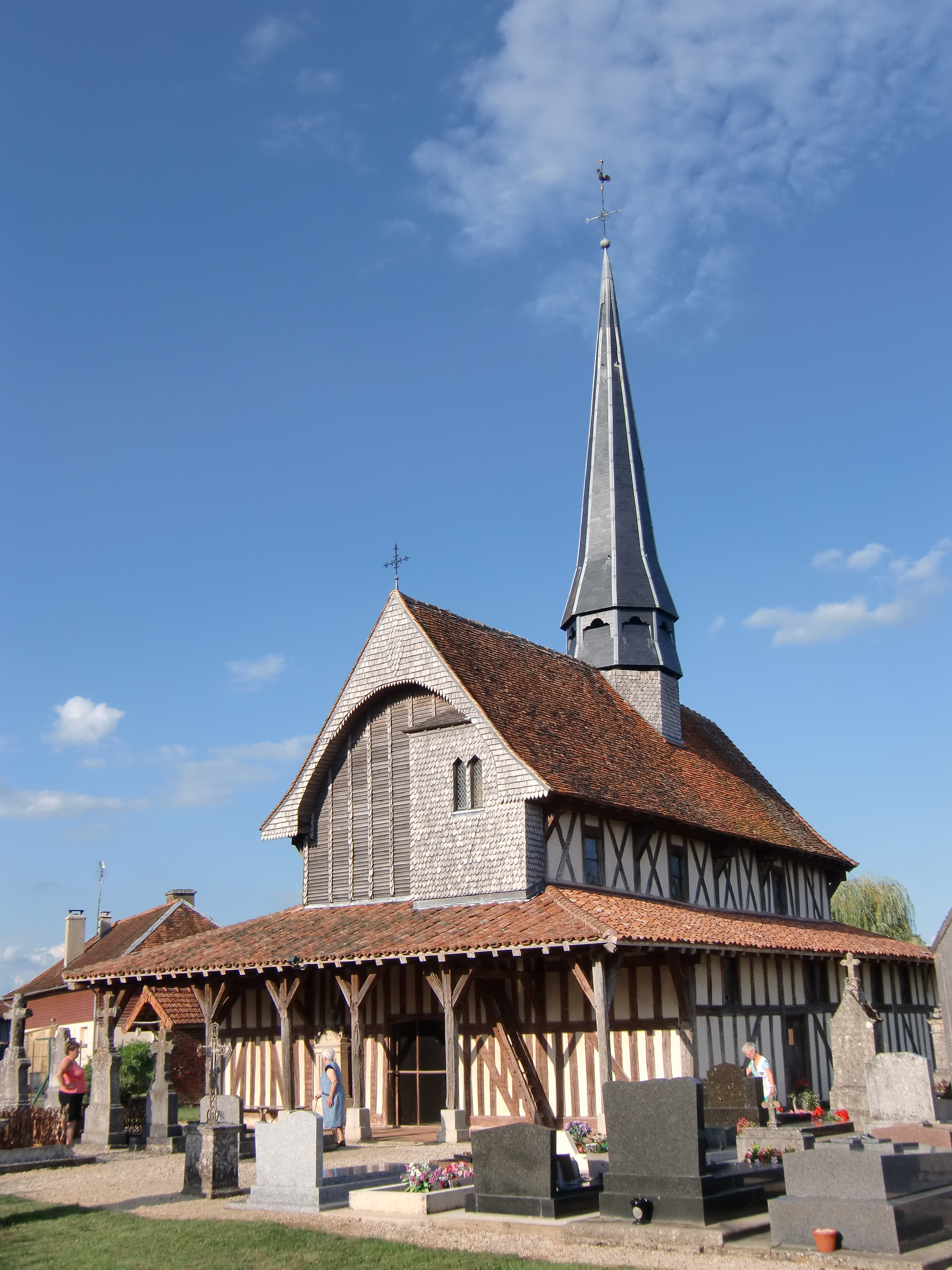 Eglise de Bailly-le-Franc (Aube - Champagne - France) édifice à pans de bois du pays du Der